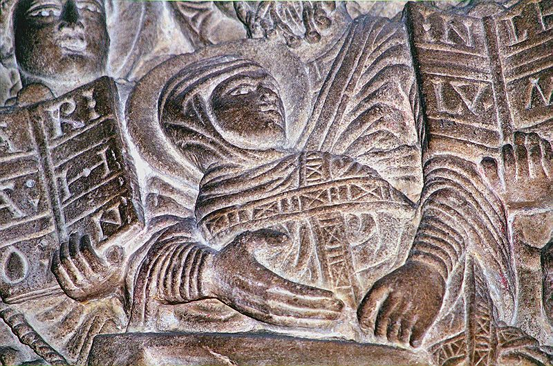 Assumption, Chapîteau de Notre-Dame du Port